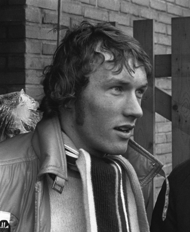 Jos Valentijn